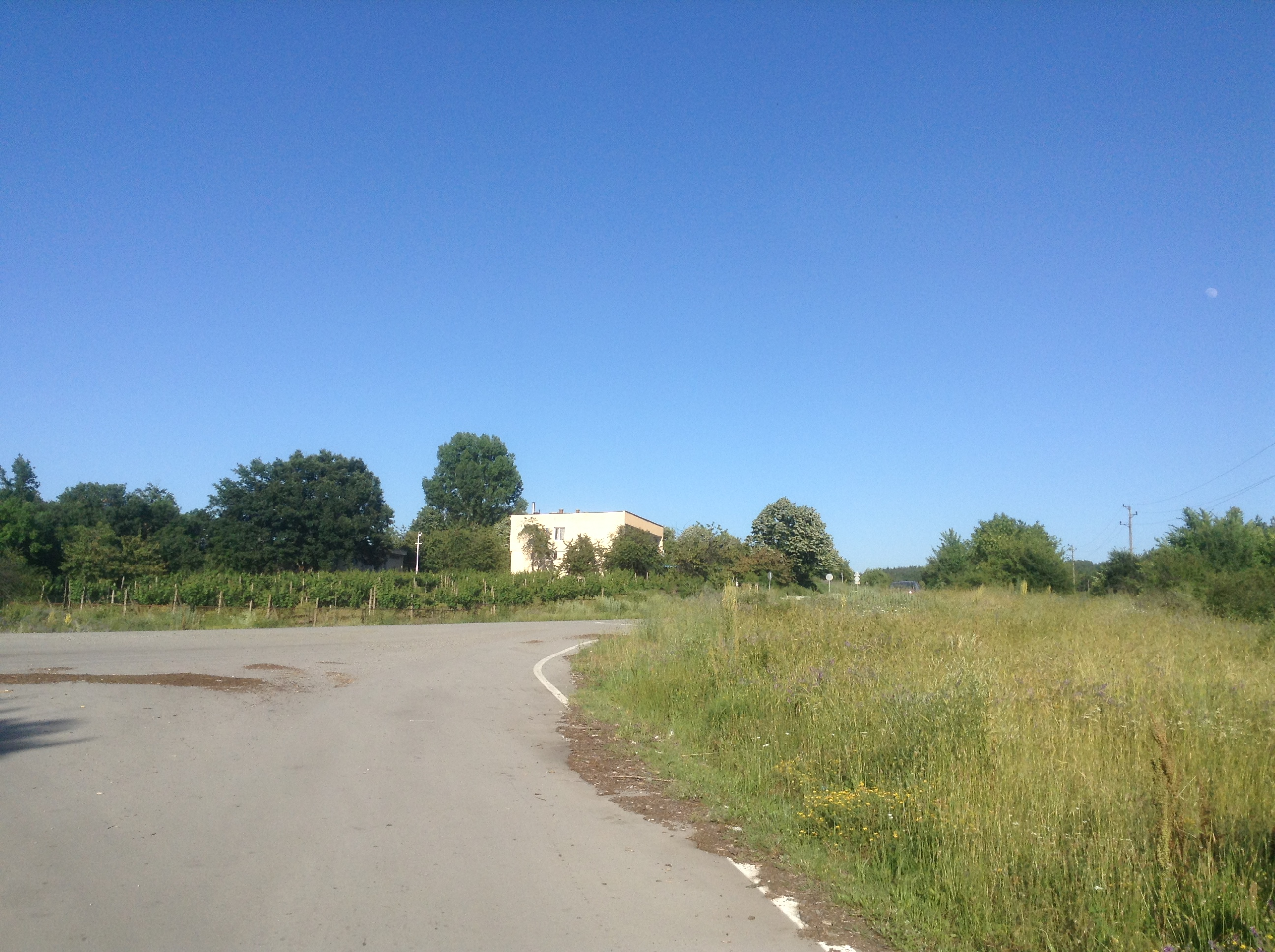 Камчия